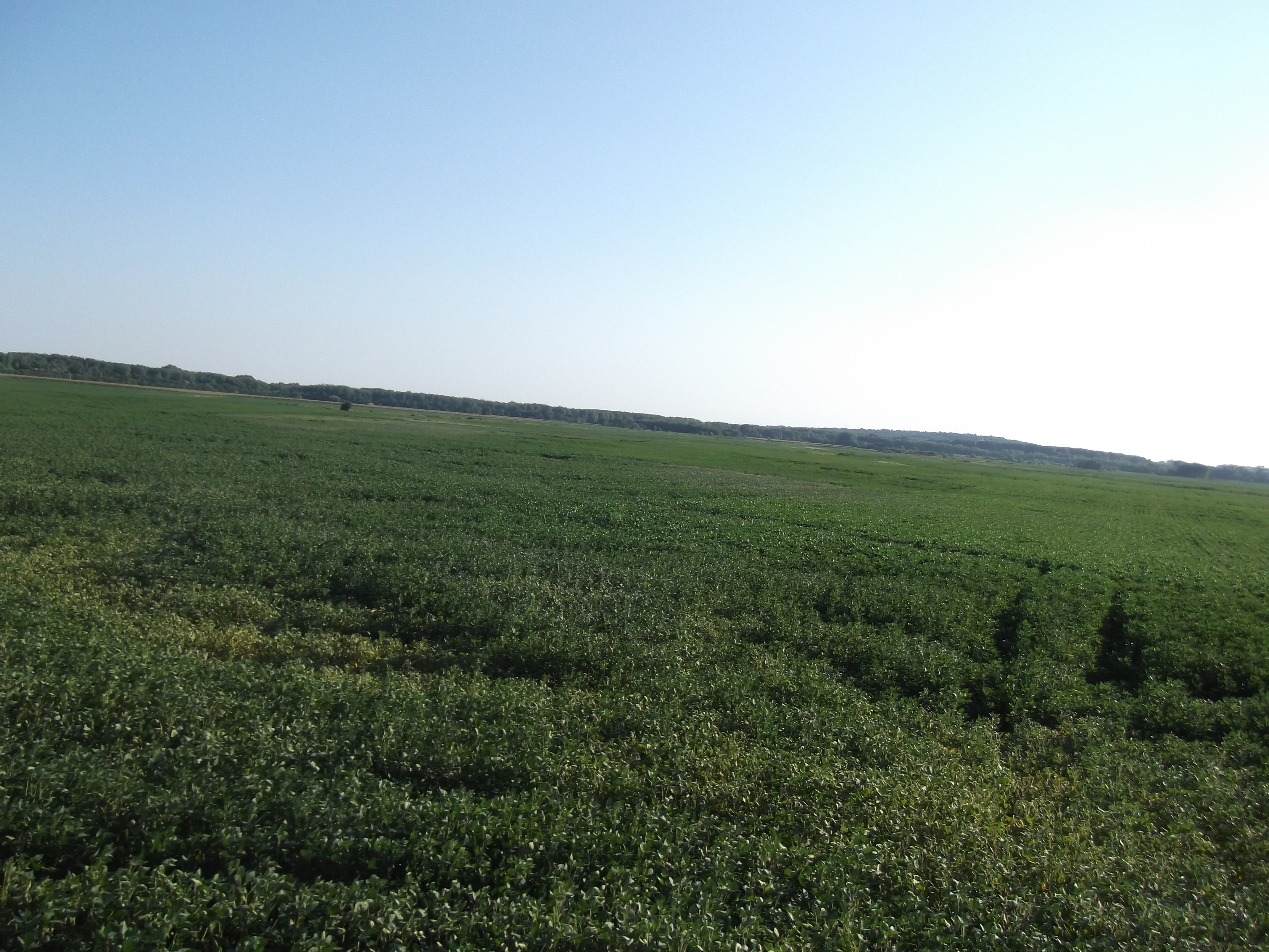 Kengyiai tájkép (Szerbia)